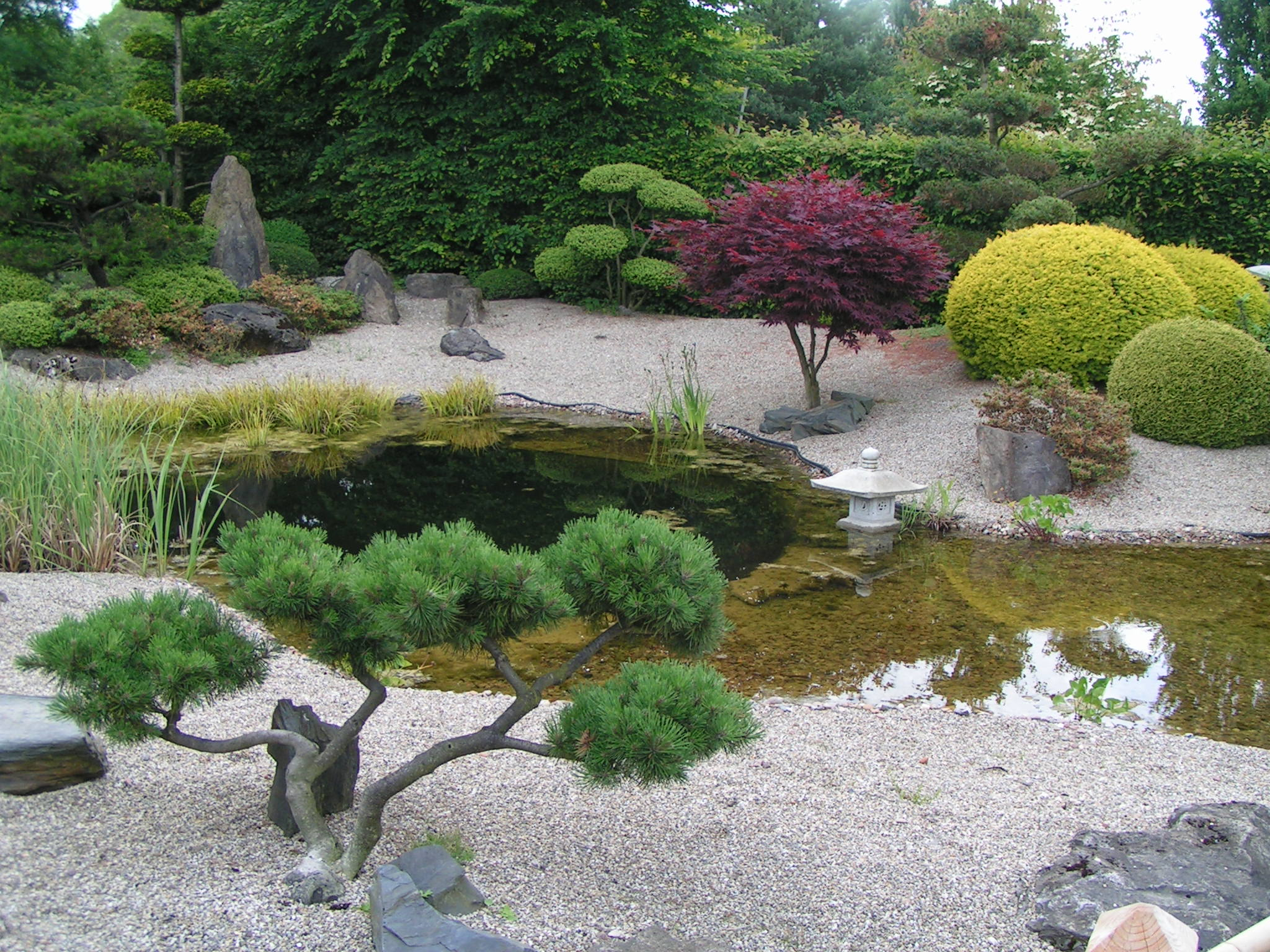 Japanischer Garten im Park der Gärten in Bad Zwischenahn-Rostrup